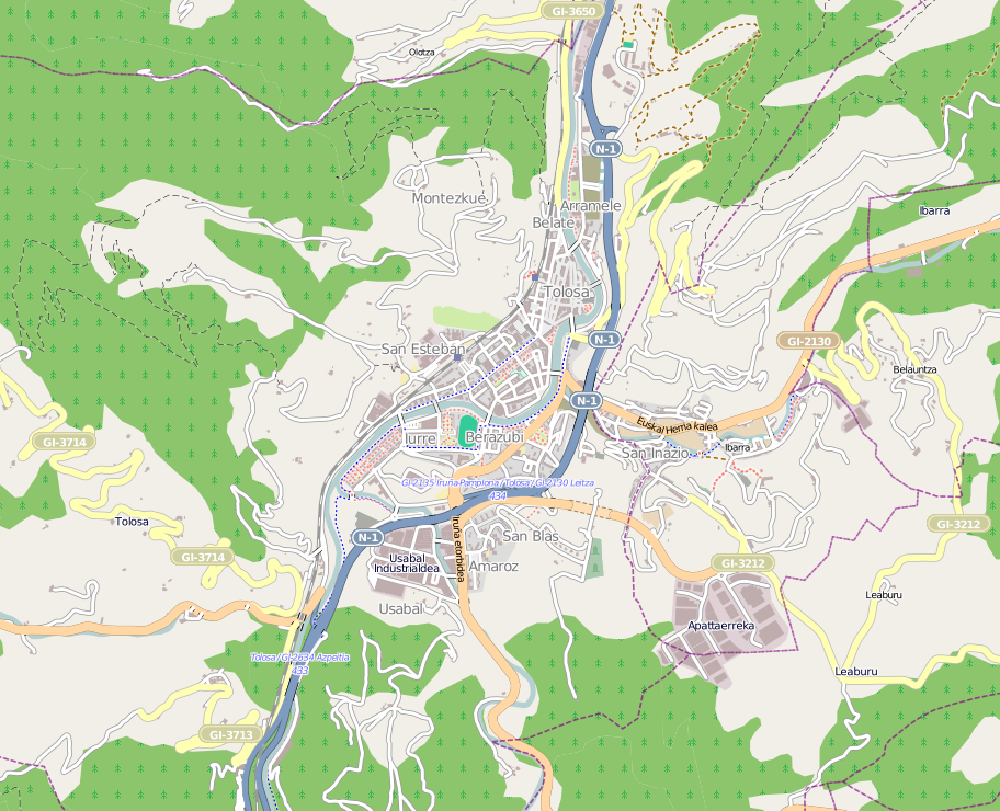 Tolosa udalerriko kokapen mapa. Gipuzkoa, Euskal Herria - Location map of Tolosa. Gipuzkoa, Basque Country.